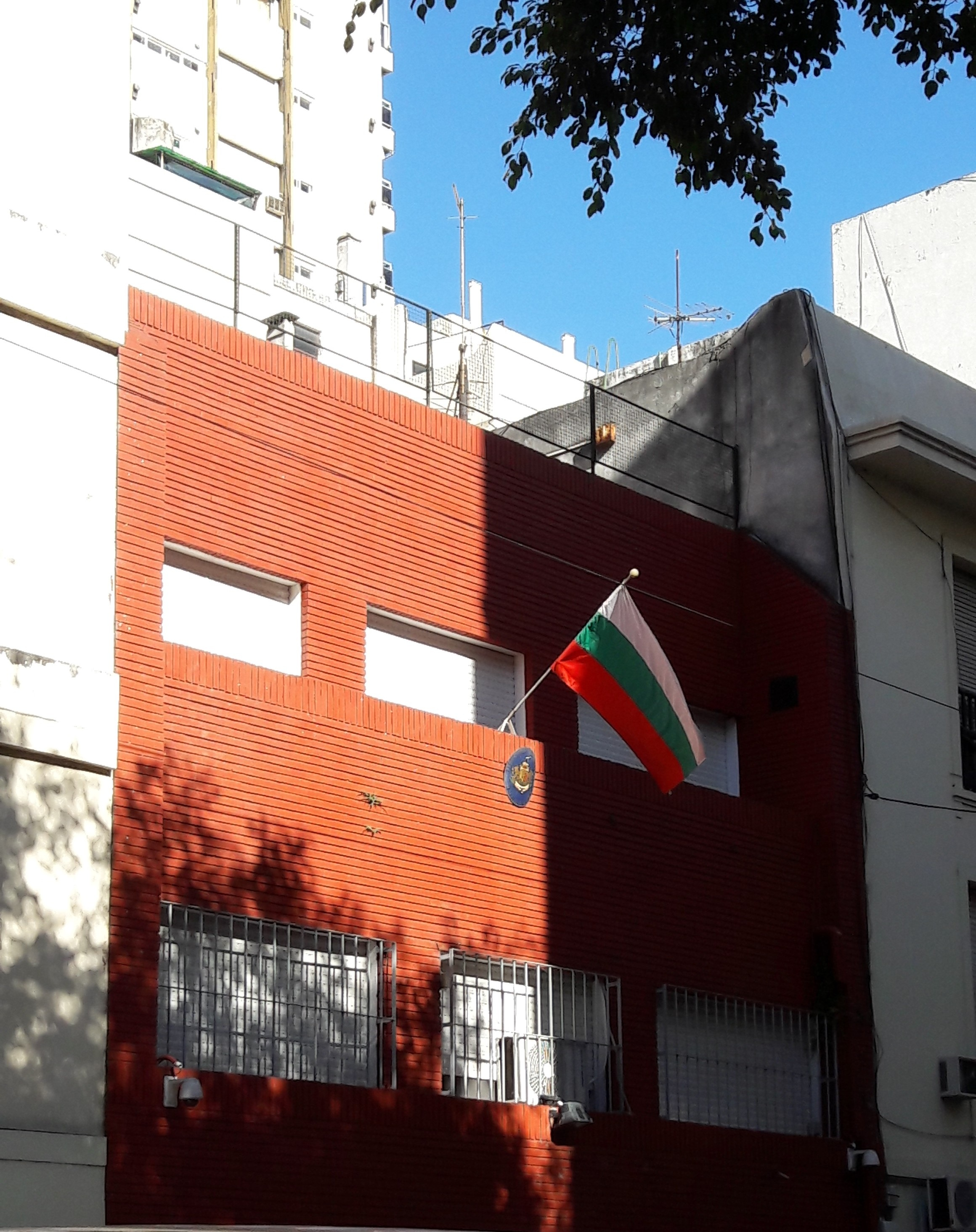 Embajada de Bulgaria, Belgrano, Buenos Aires, Argentina.